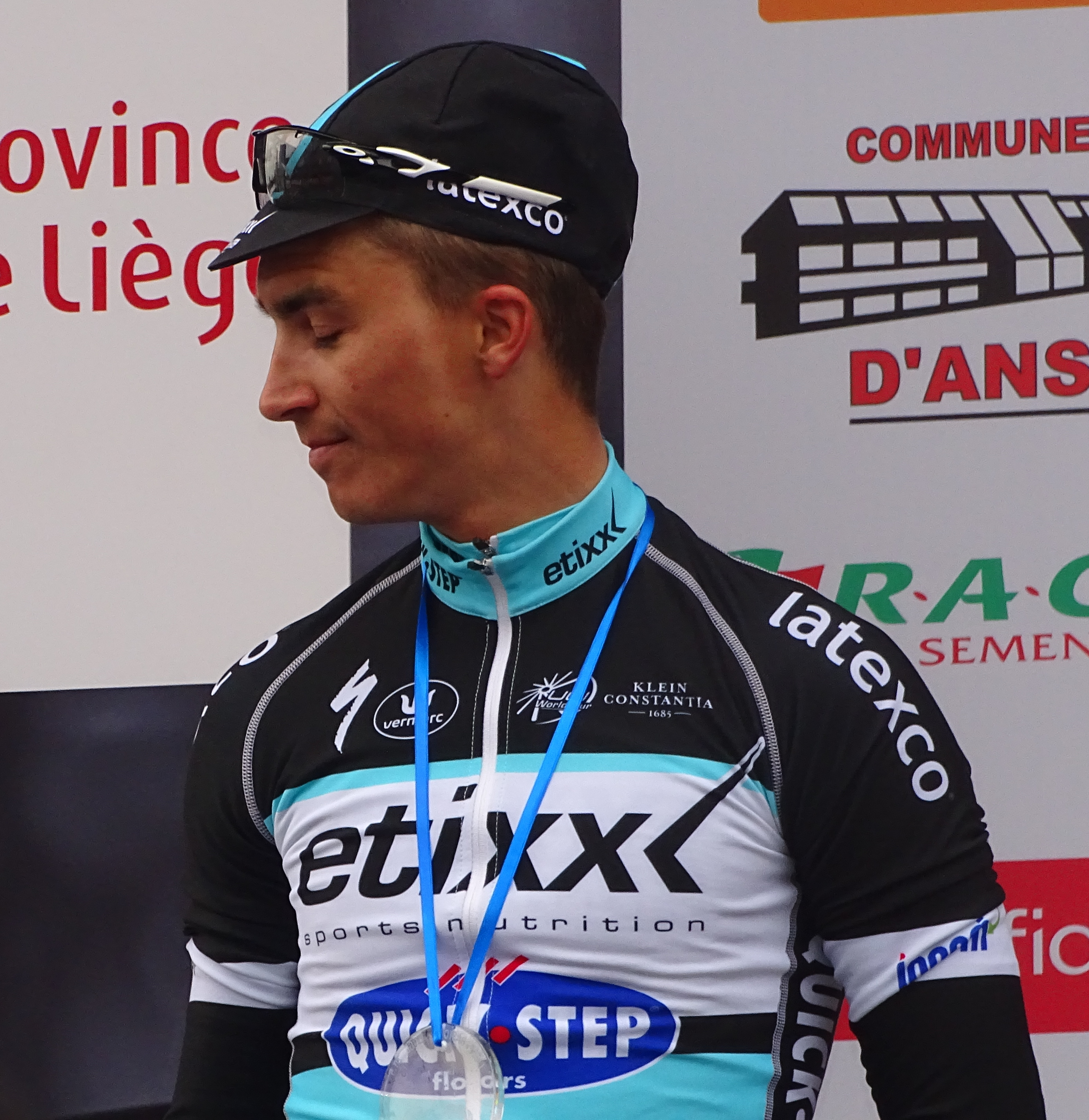 Reportage réalisé le dimanche 26 avril à l'occasion de l'arrivée de Liège-Bastogne-Liège 2015 à Ans, Belgique.